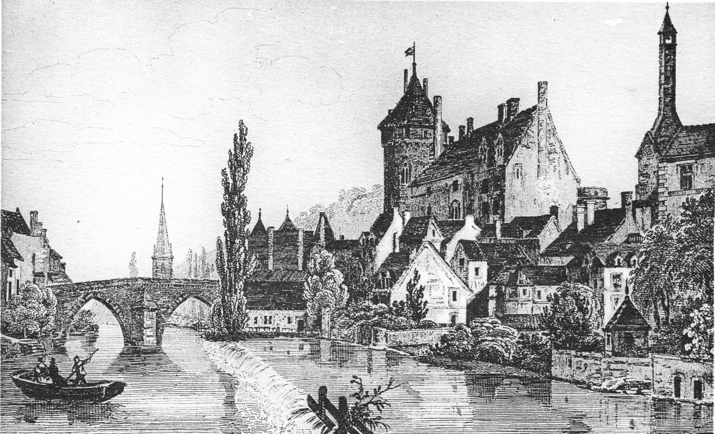 Le château, Jean-Baptiste Messager, in La Mayenne pittoresque, 1846.